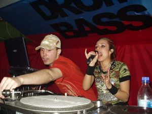 Ruská drum n bassová dvojice Stim axel